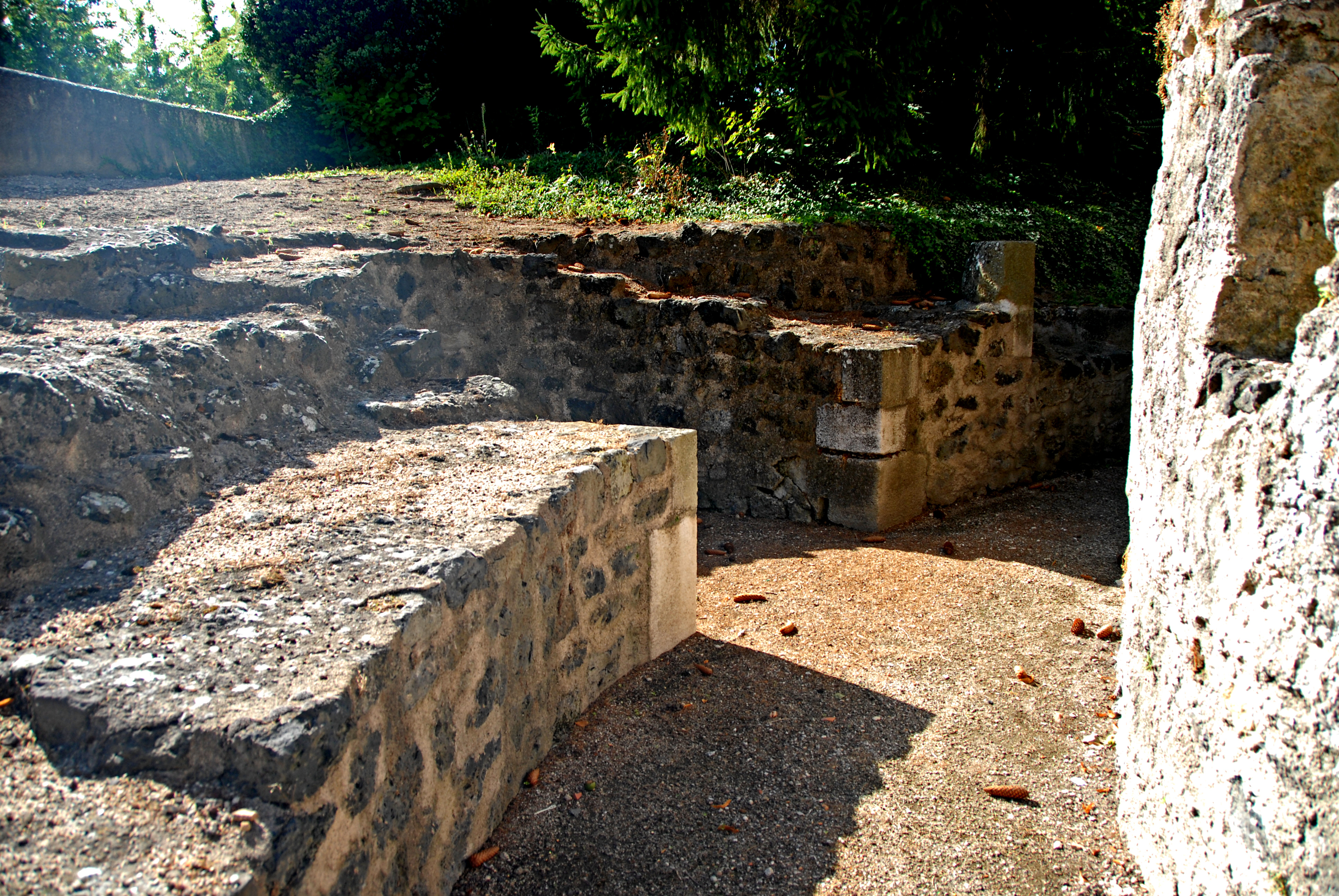 Mozat, Krypta, Umgangskapelle